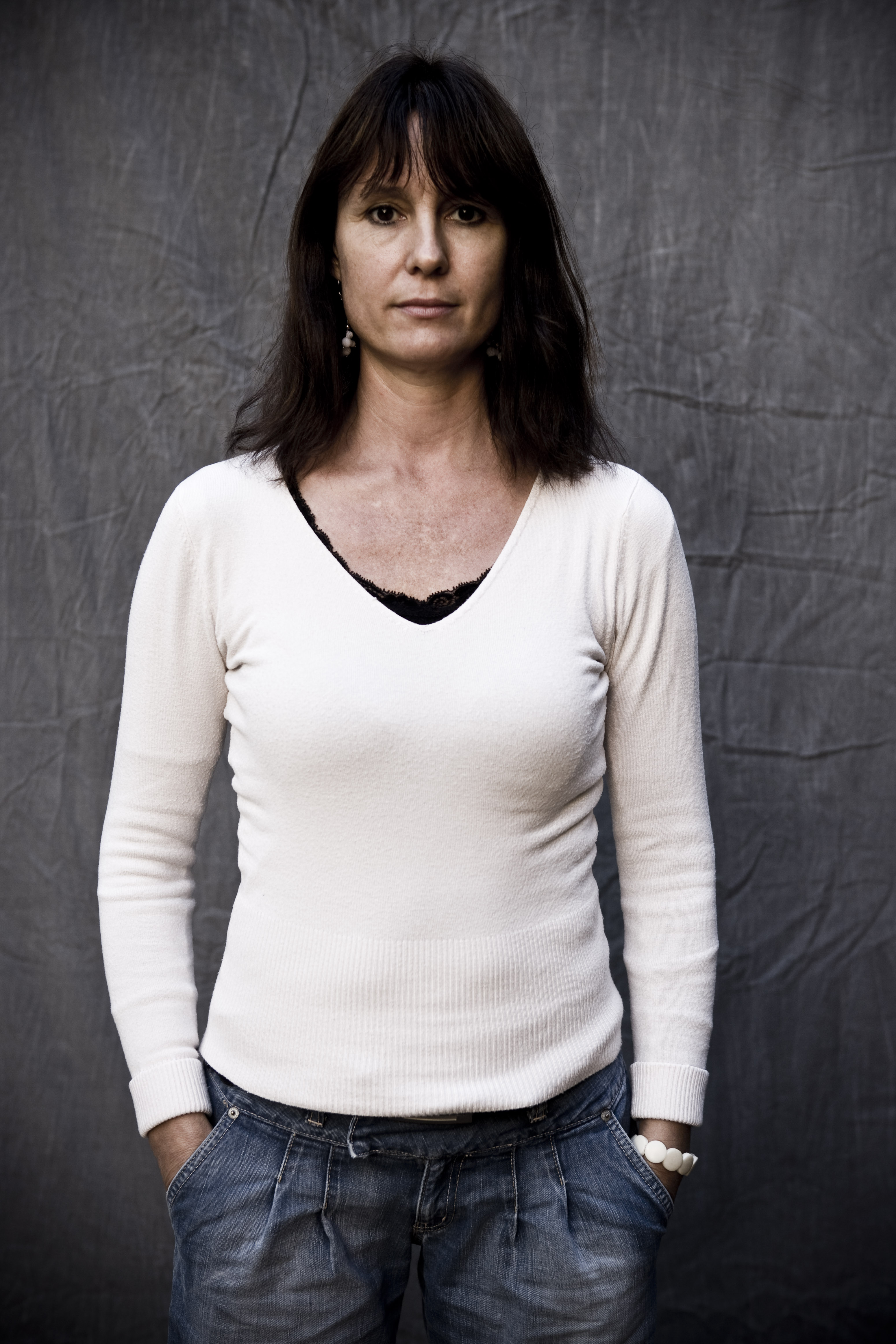 Anne Jortveit er en norsk journalist.